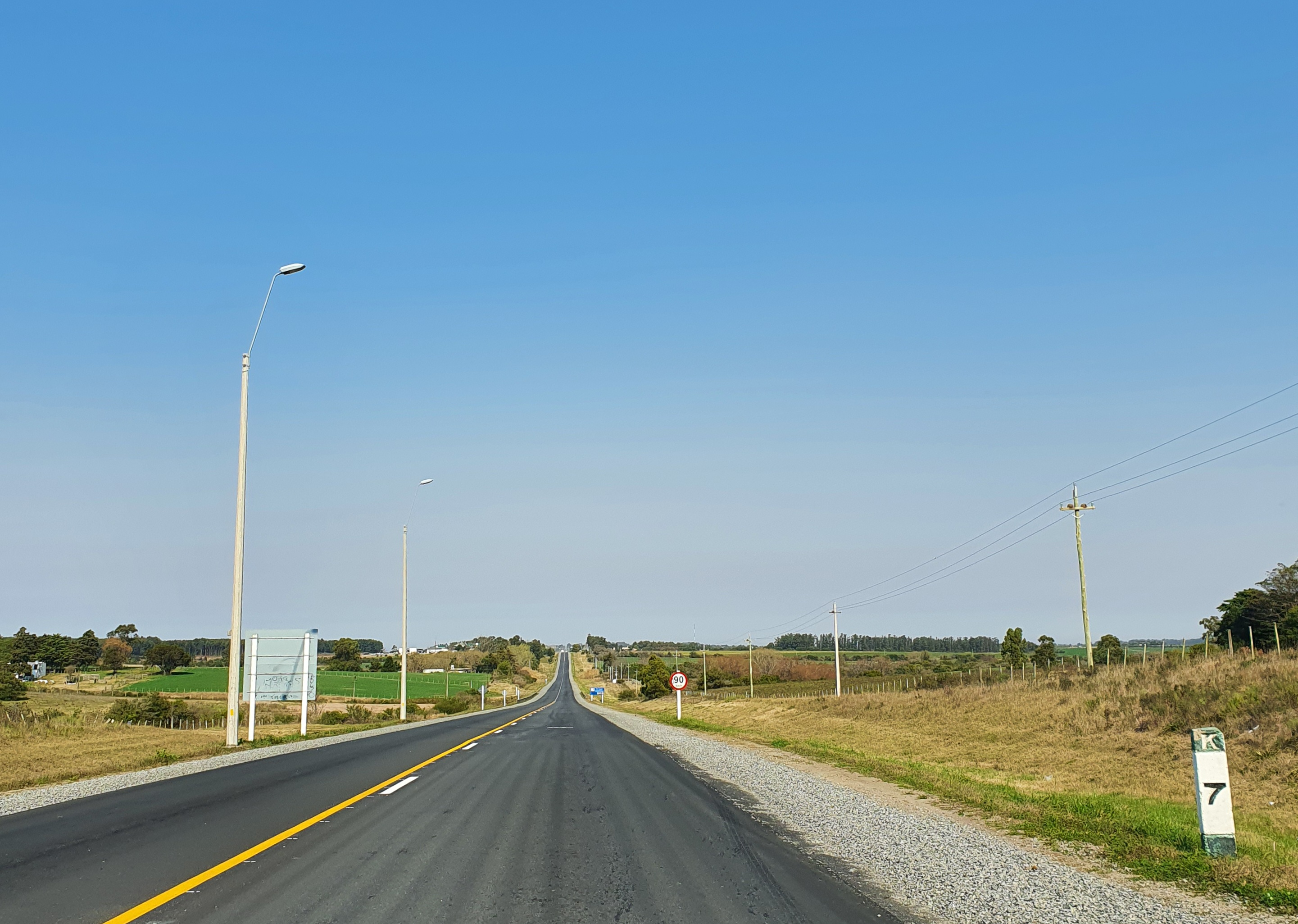 Ruta 54, km 7 sentido sur. Colonia. Uruguay.